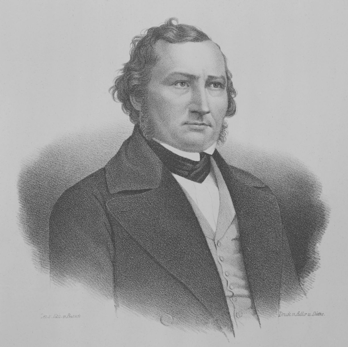 Carl Gotthelf Todt, Jurist und Politiker, Bürgermeister von Adorf, Mitglied der Provisorischen Regierung in Sachsen 1849